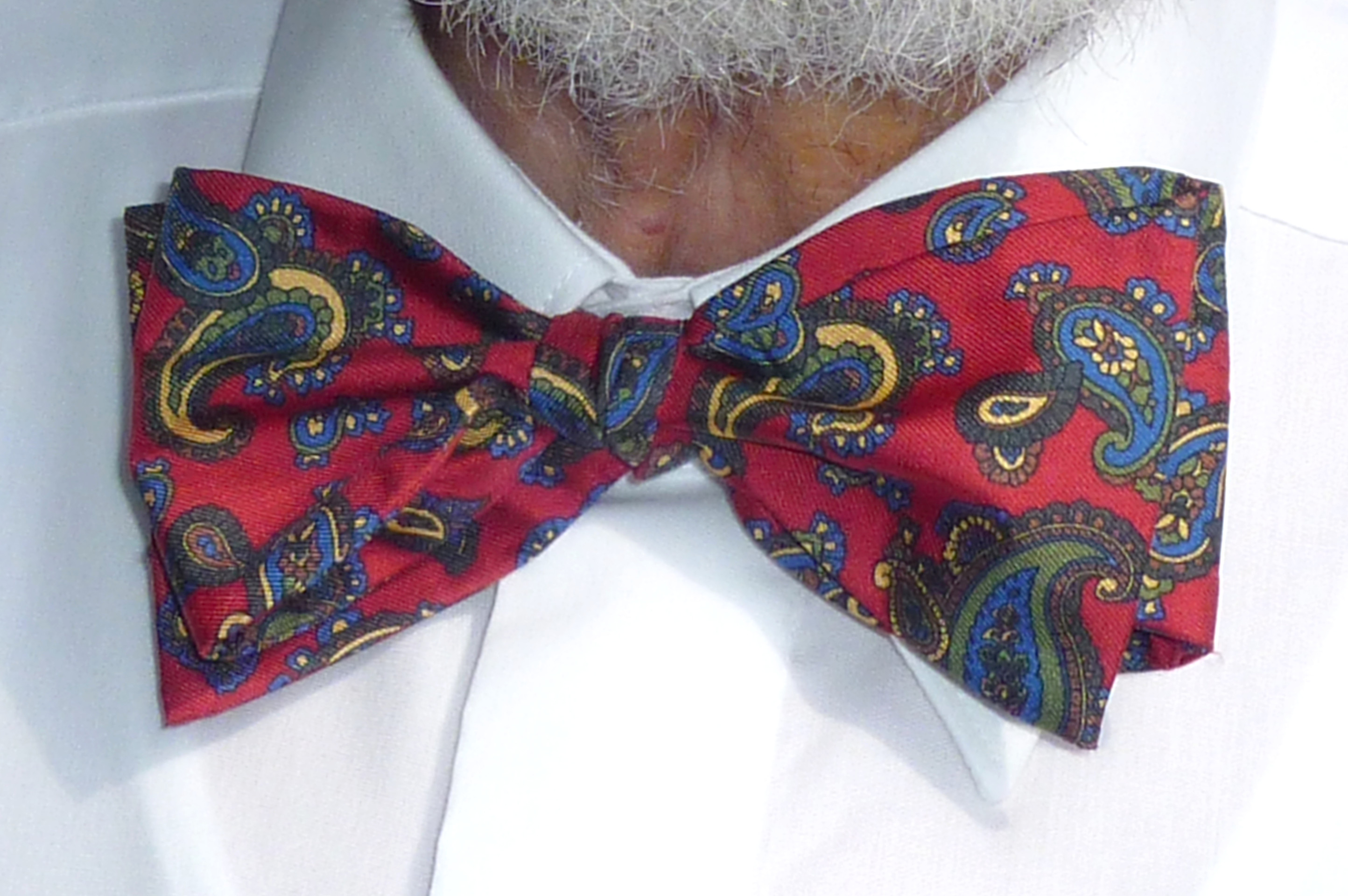 Querbinder, Seide, selbstgebunden, Paisleymuster